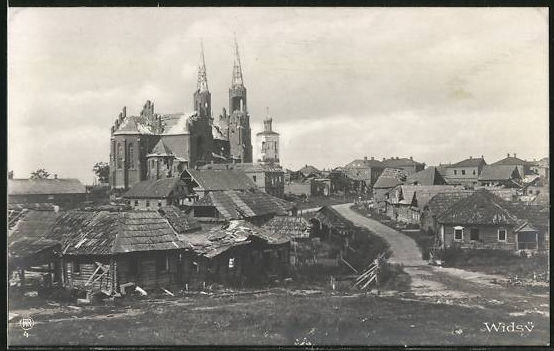 Троіцкі касцёл, Відзы